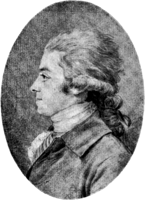 Portrait of Jean-Baptiste Fleuriot-Lescot (1761-1794), Belgian Revolutionist